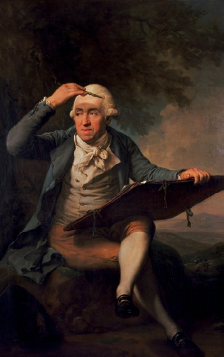 Adrian Zingg porträtiert von Anton Graff